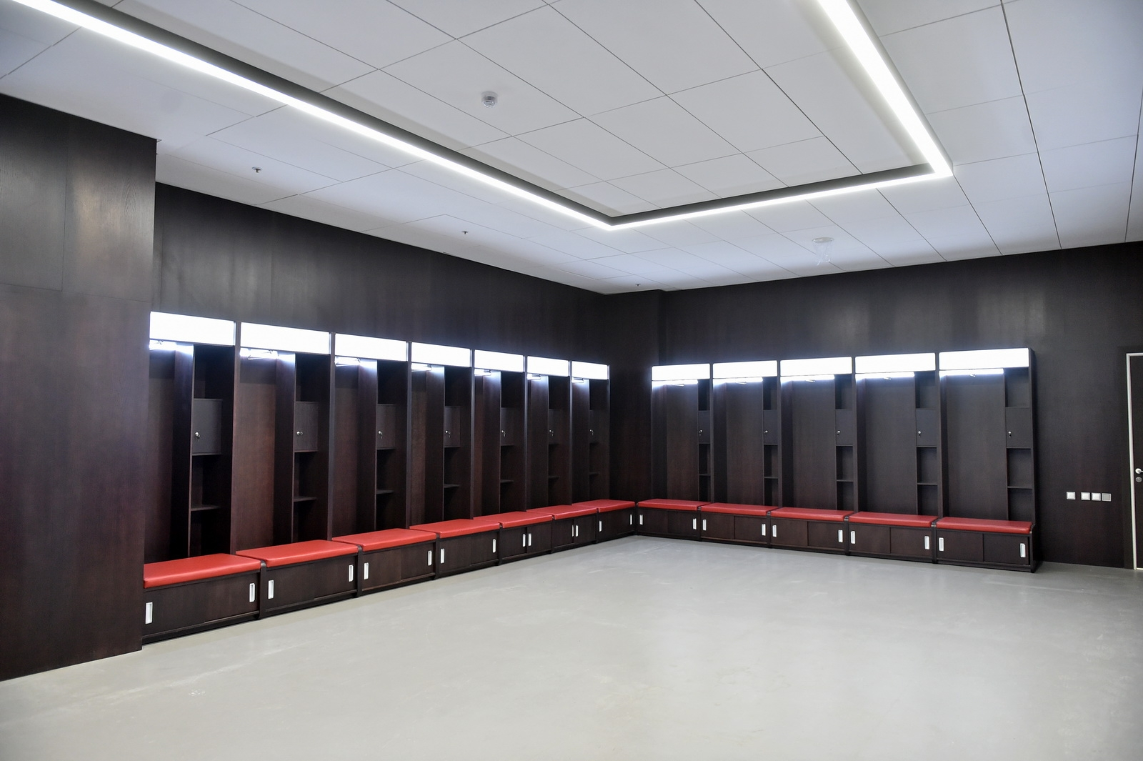 Реконструкция стадиона «Лужники» в Москве.